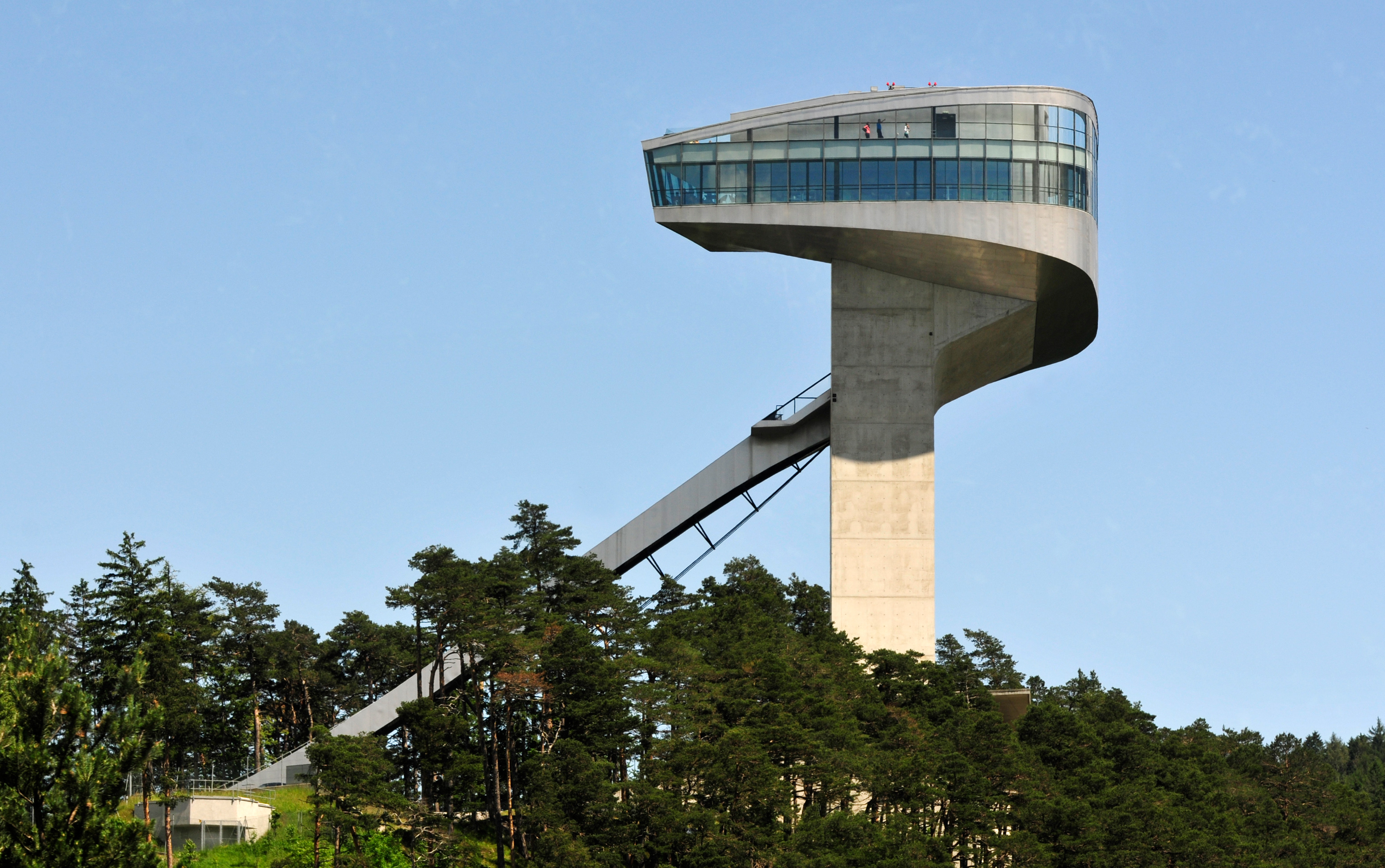 Innsbruck Im Rahmen des Fußballländerspiels Österreich gegen Rumänien bin ich einige Stunden durch Innsbruck gefahren und habe Aufnahmen gemacht, die vielleicht mal gebraucht werden könnten. --Ralf Roleček 11:20, 10 June 2012 (UTC) The making of this work was supported by Wikimedia Austria. For other files made with the support of Wikimedia Austria, please see the category Supported by Wikimedia Österreich.